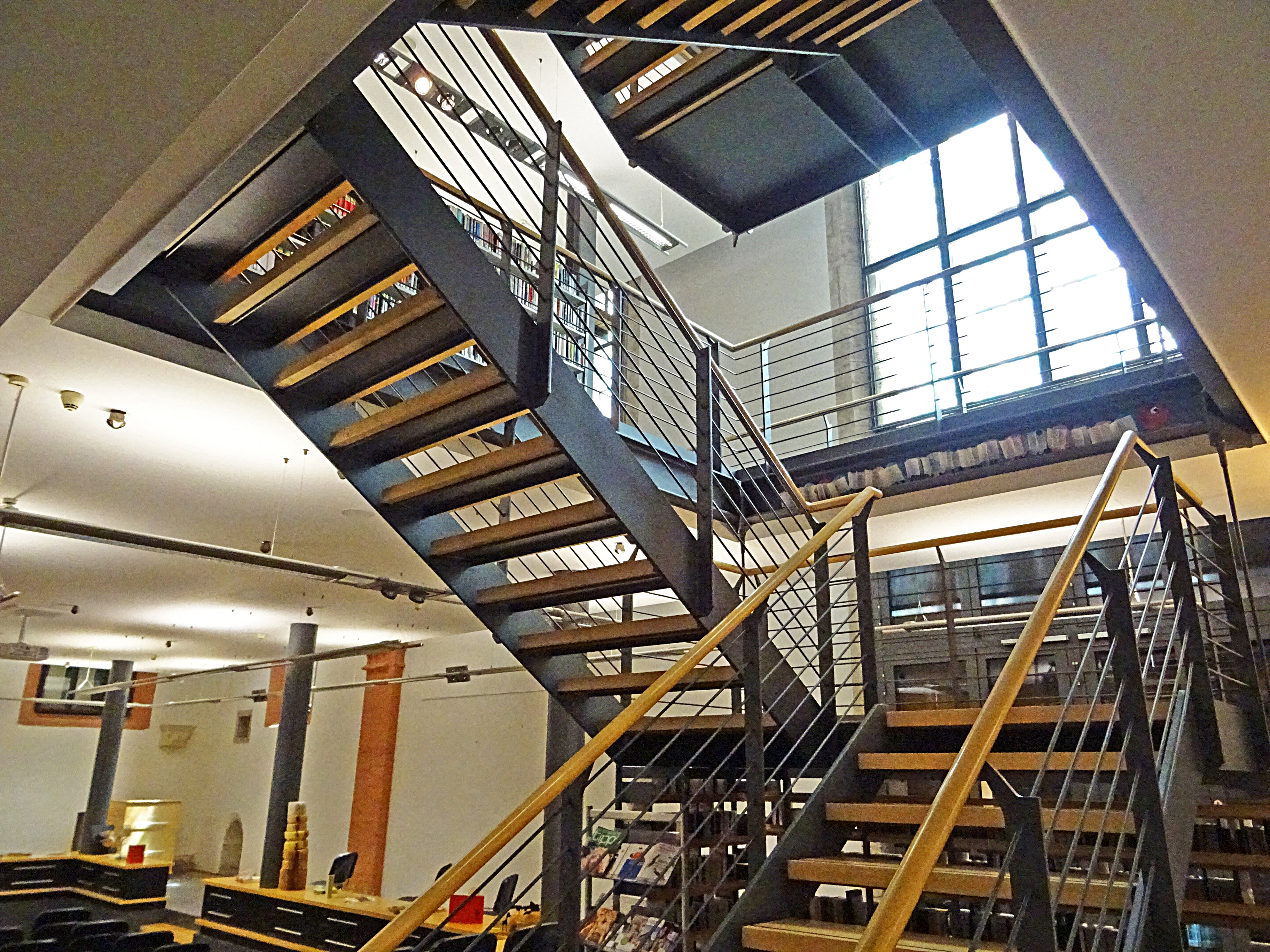 Stadtbibliothek in der umgenutzten Jacobikirche (Mühlhausen, Thüringen)